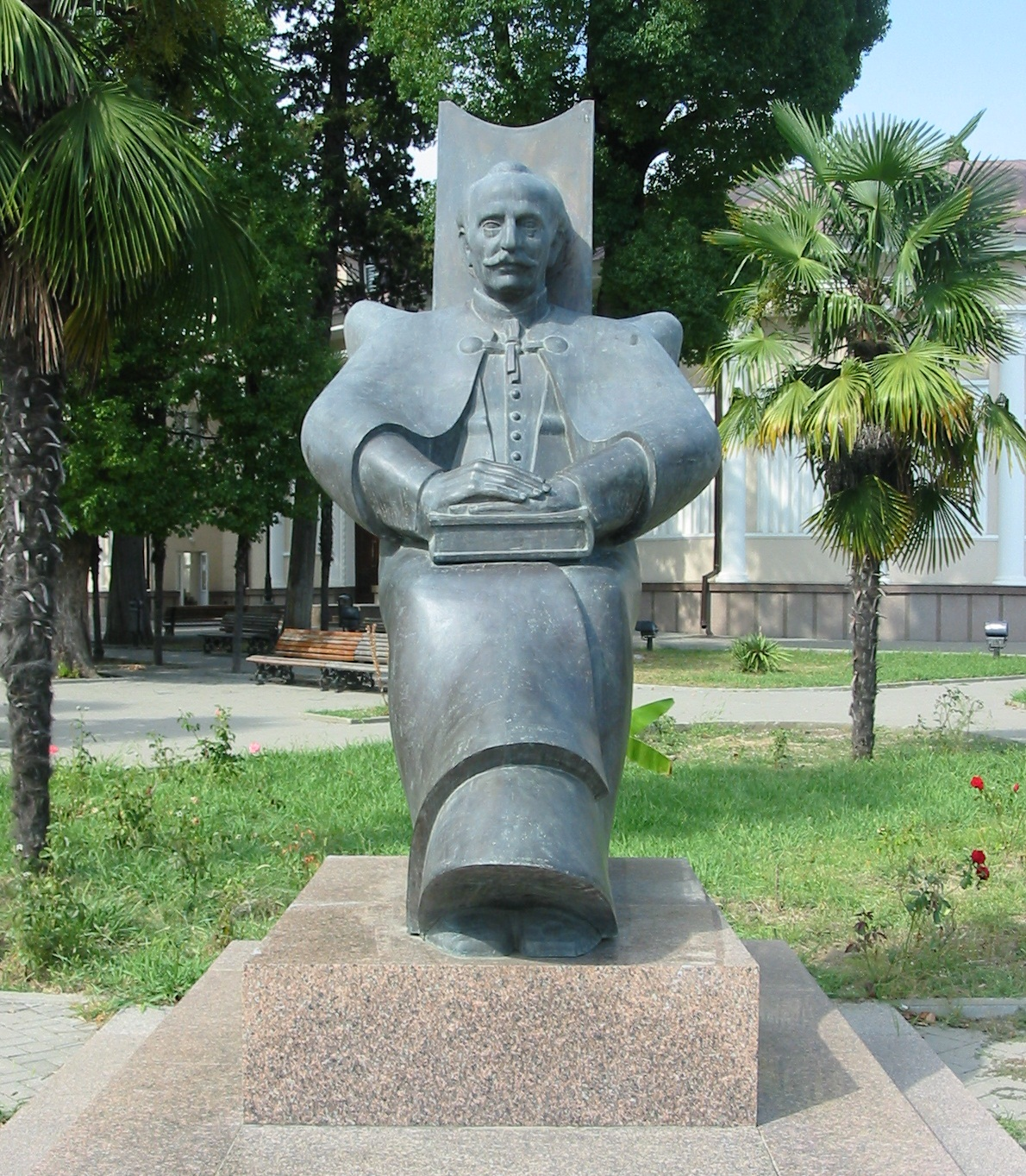 Памятник Дмитрию Гулиа, город Сухум.